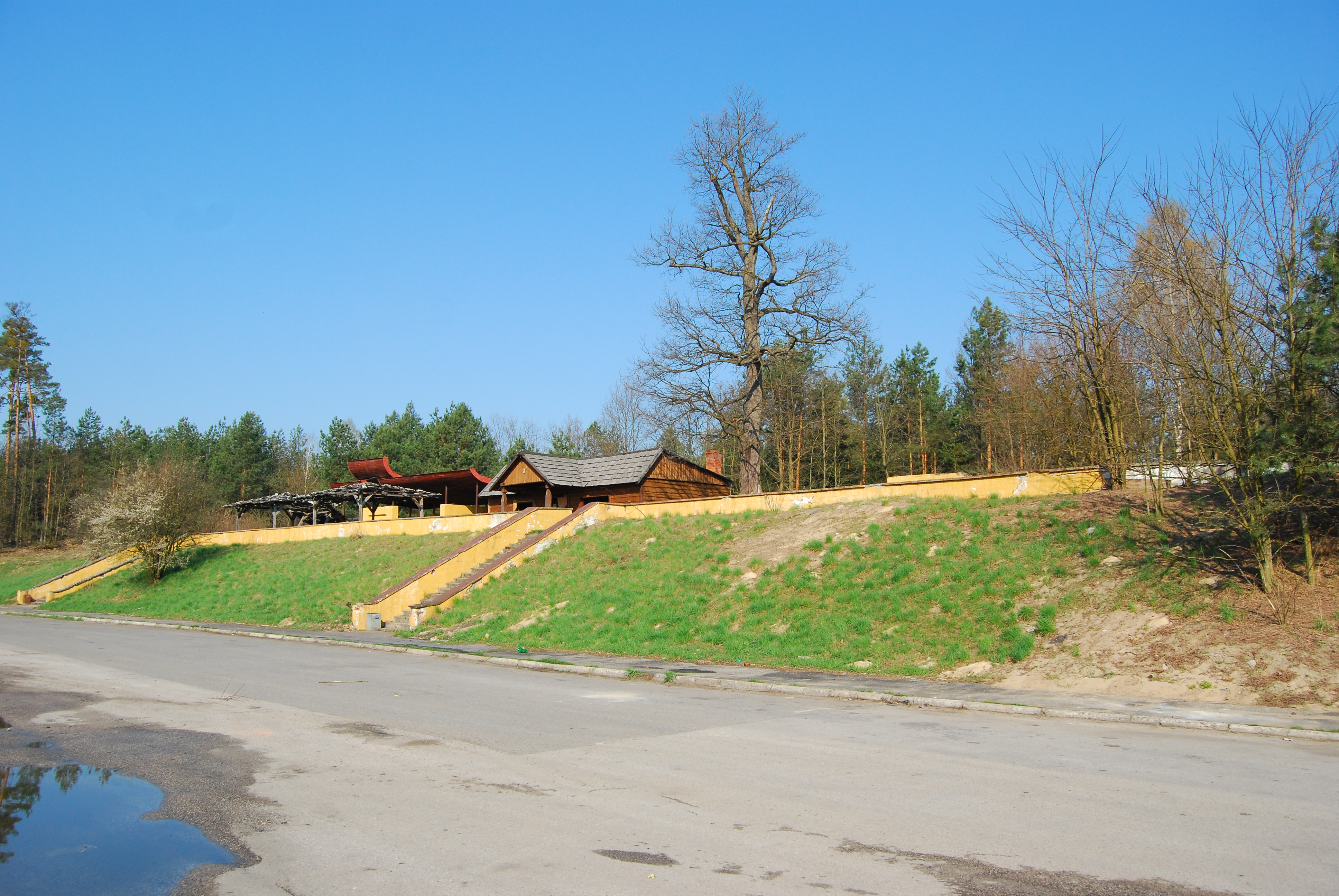 Parking przy rezerwacie Załamanek. Fot. Artur Rybakowski.